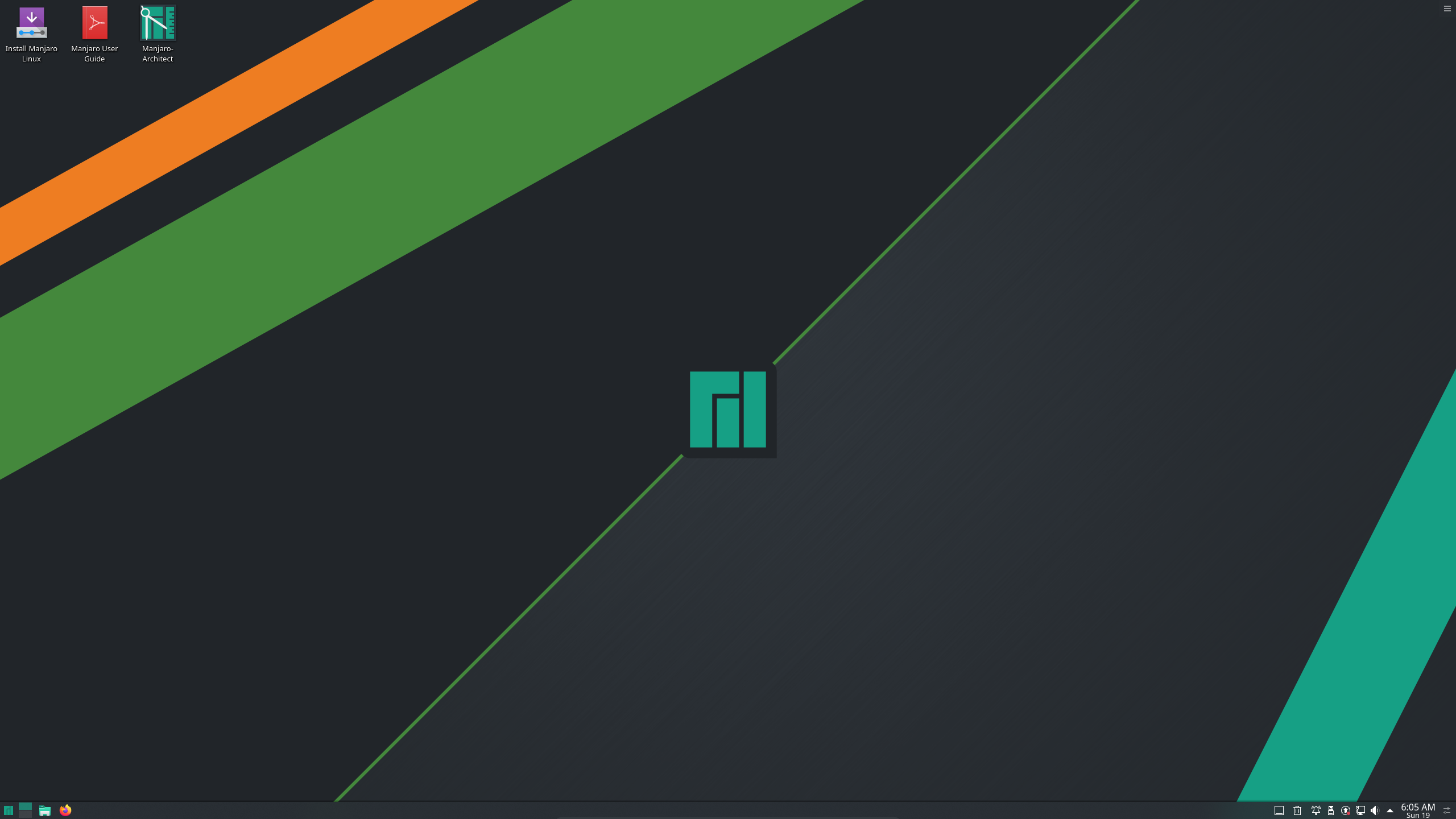 Screenshot of Manjaro Kyria 19.0.2 KDE Edition